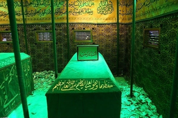 پنجابی: قبر نرجس خاتون